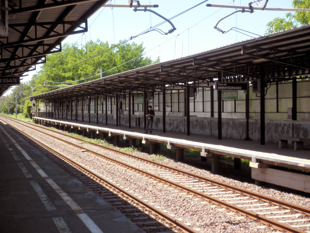 Interno della stazione di Cascina Burrona sulla linea M2 della metropolitana di Milano